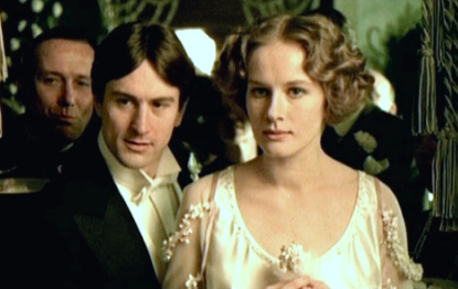 Screenshot del film Novecento (1976)